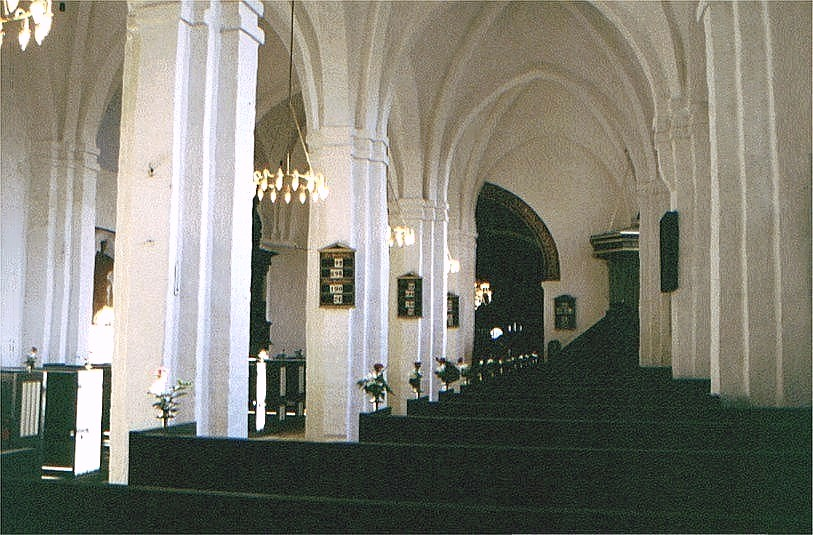 Skibby Kirke i Danmark. Søndre skib set mod øst